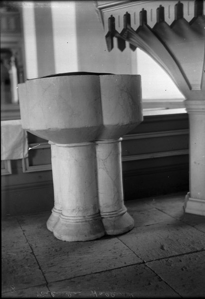 Dopfunt, snabbinv. Kategori: (04) DopfuntarDopfunt, snabbinv.